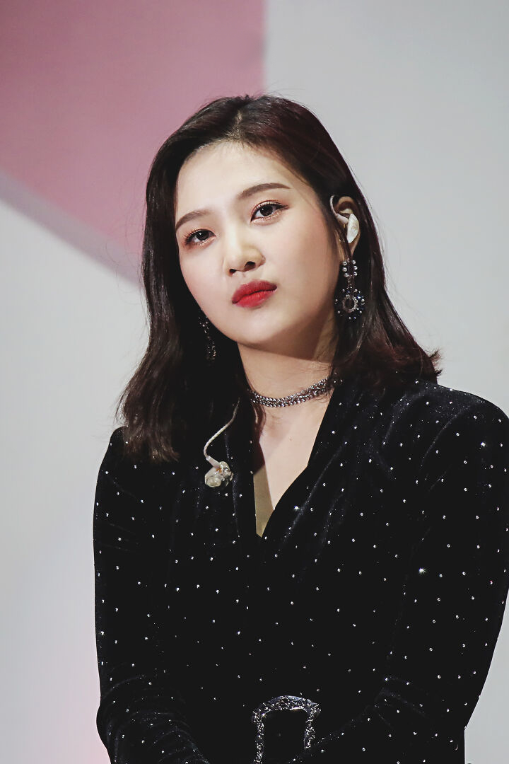 Joy Park no Concerto Etude House Pink em 14 de abril de 2018